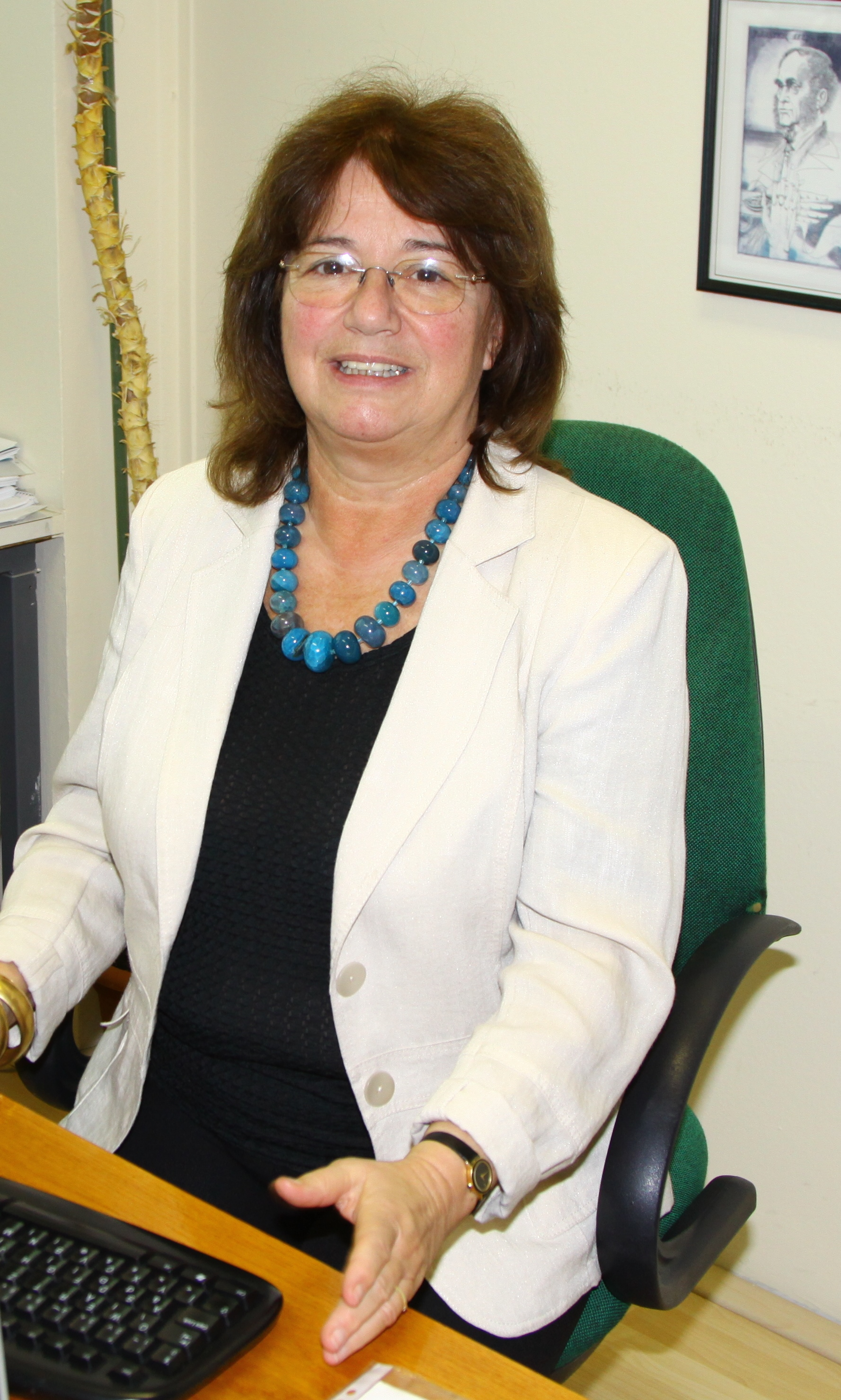 Kép Forrai Juditról